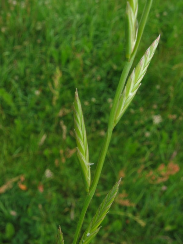 Welsches Weidelgras (Lolium multiflorum), Gragetopshof